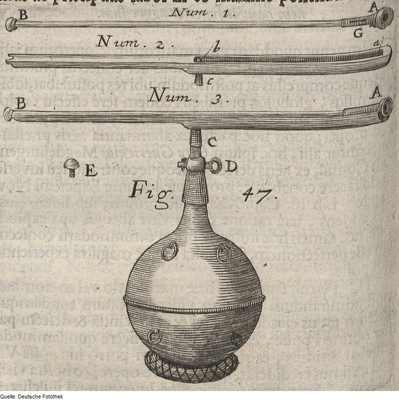 Original image description from the Deutsche Fotothek Physik & Pneumatik & Luftdruck & Gewehr